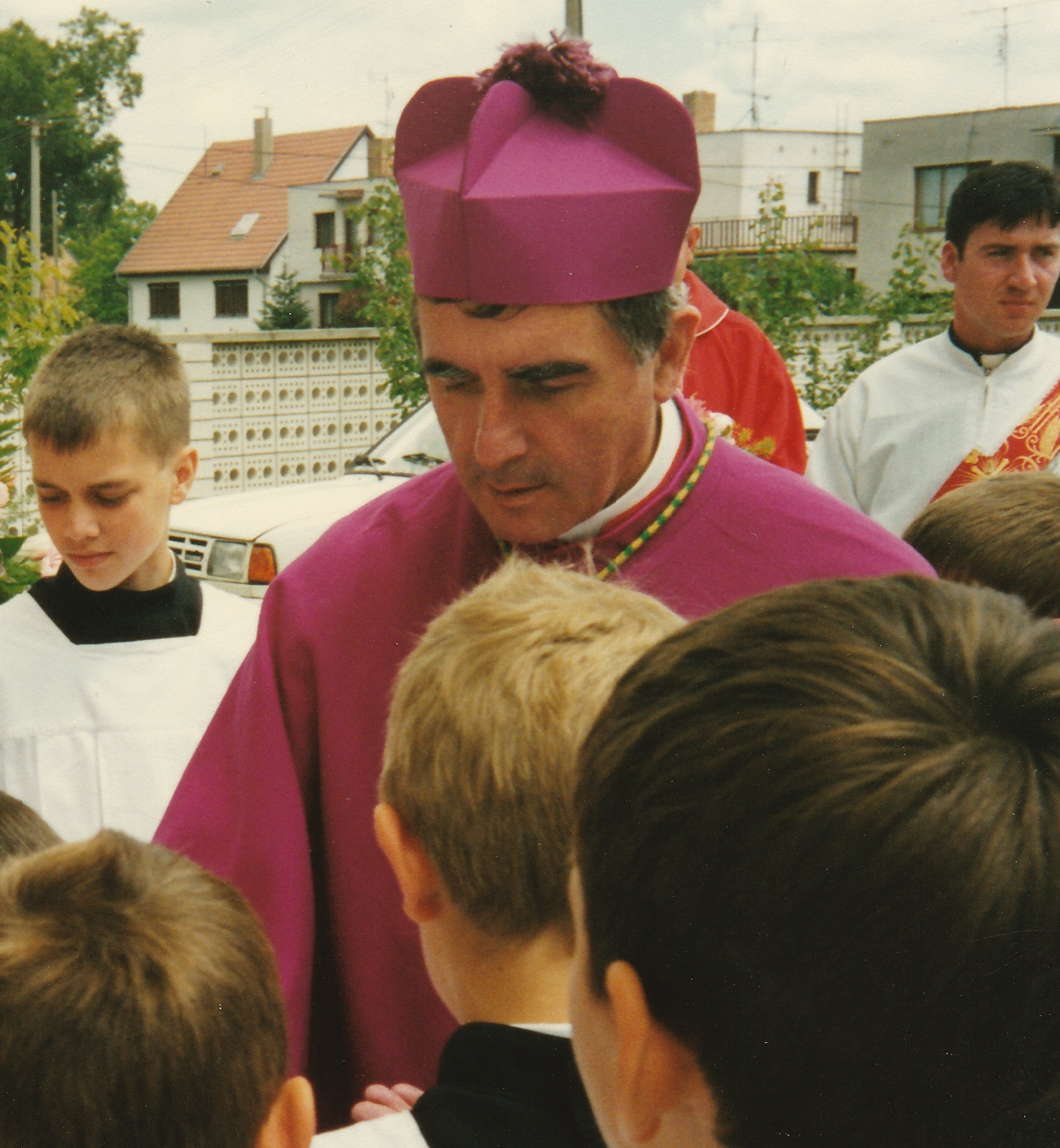 Biskup Vladimír Filo pred farou v Tomášove.